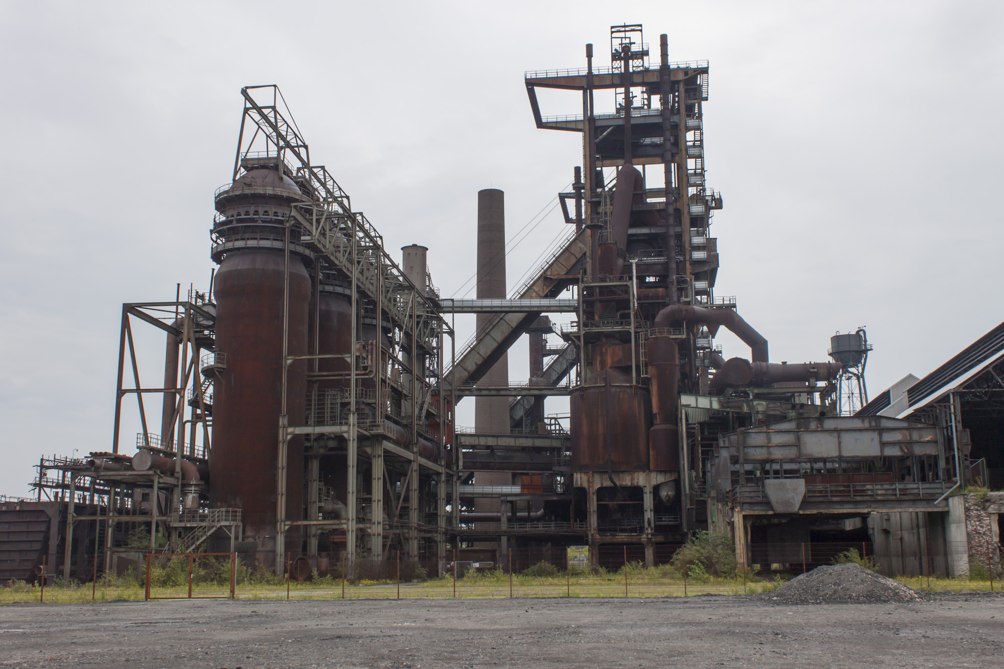 Hochofenwerk Phoenix-West Westseite This is a photograph of an architectural monument. 0938